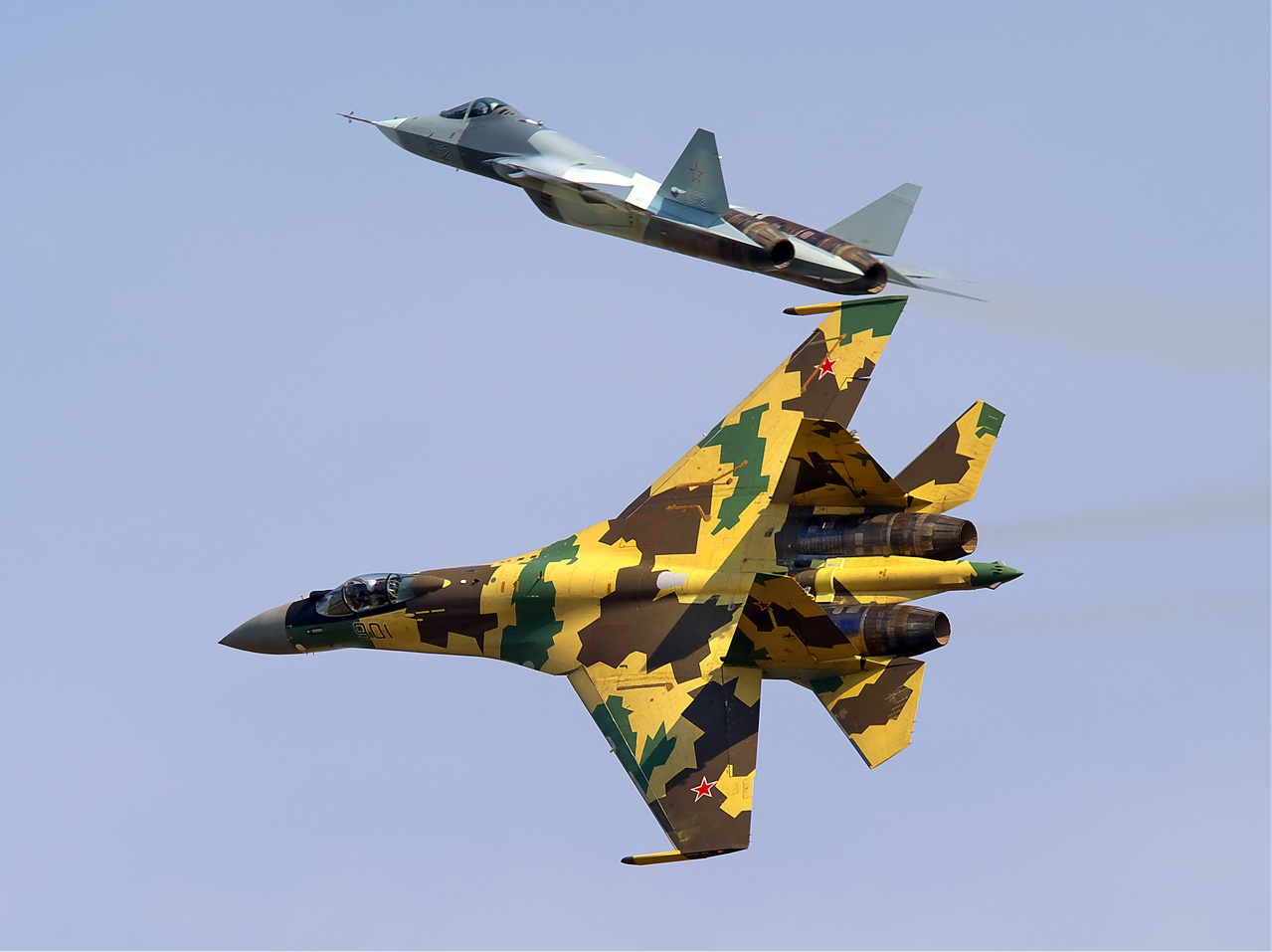 Sukhoi Su-35BM and Sukhoi T-50 at MAKS 2011